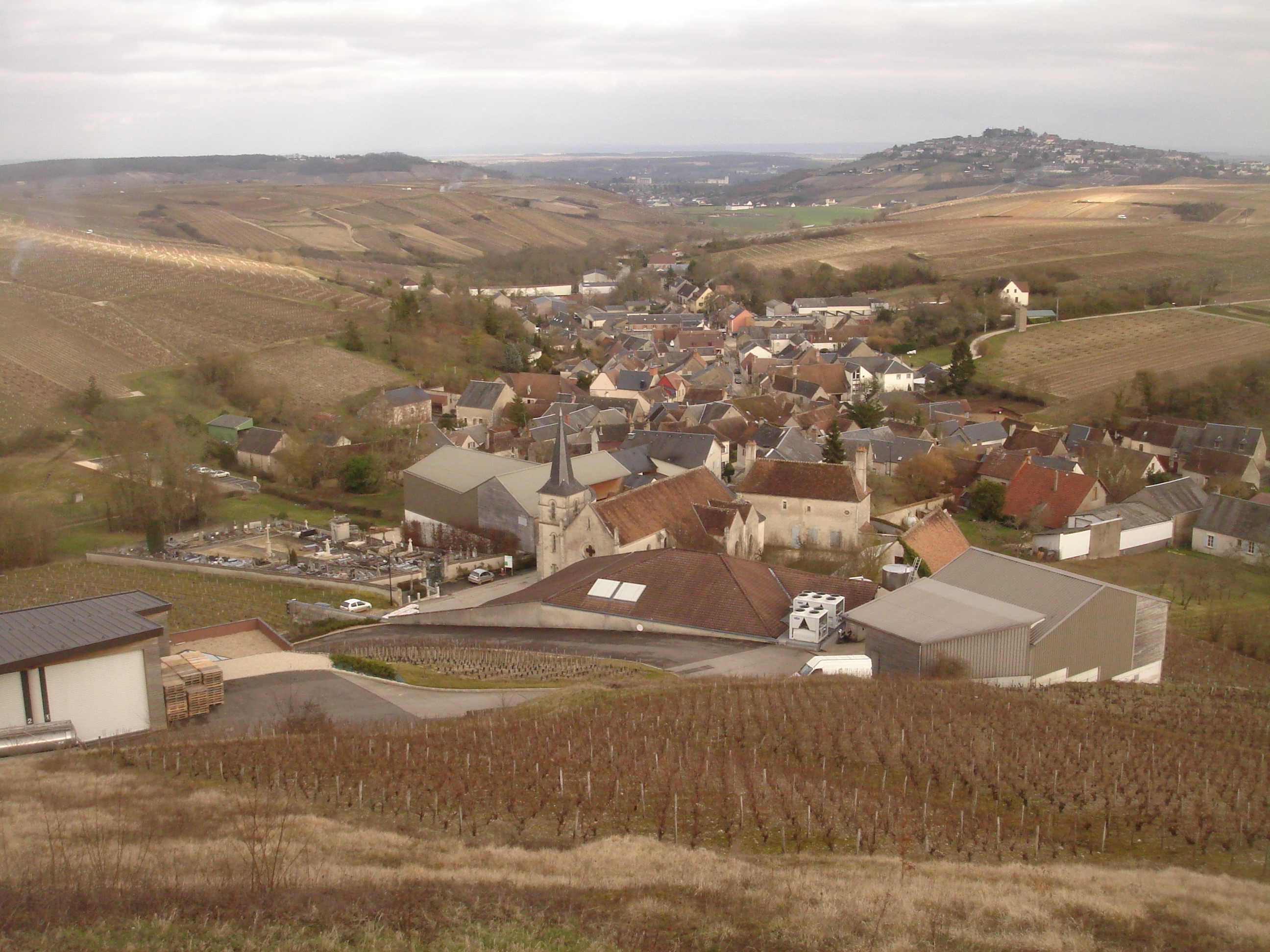 Ancienne commune de Chavignol, Sancerre, Cher, Centre, France